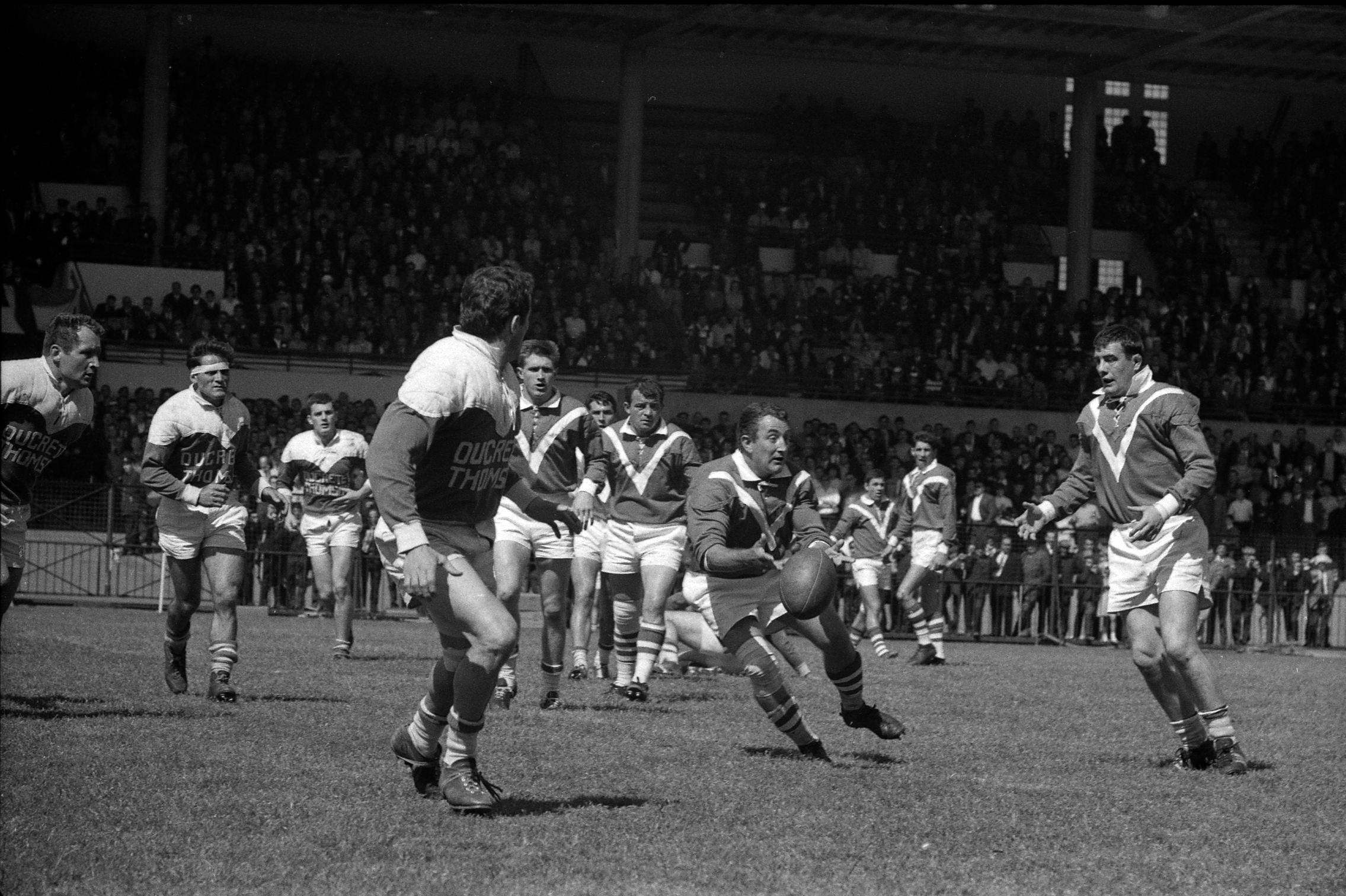 Stadium municipal de Toulouse, 1bis allées Gabriel-Biénès. 10 mai 1964. Finale du championnat de France de rugby à XIII. Equipe du Toulouse Olympique XIII rencontre l'équipe de Villeneuve-sur-Lot. Cliché pris durant le match ; au 1er plan action de jeu ; en arrière plan tribune du stade.